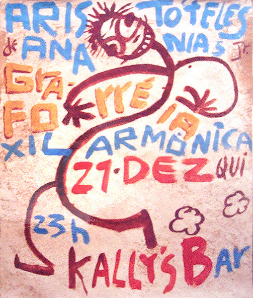 Exemplo dos cartazes artesanais para um show conjunto das bandas Aristóteles de Ananais Jr e Graforréia Xilarmômica, que foram produzidos pelos próprios integrantes das bandas